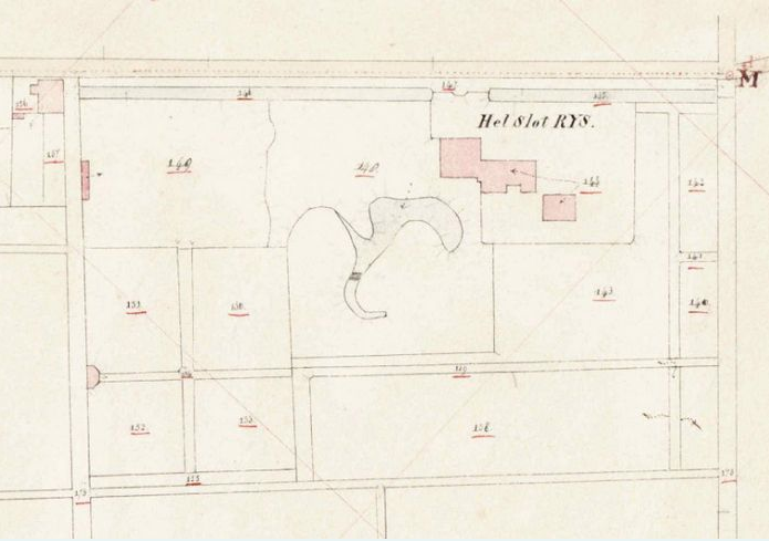 Kadasterkaart met de ligging van slot Rijs